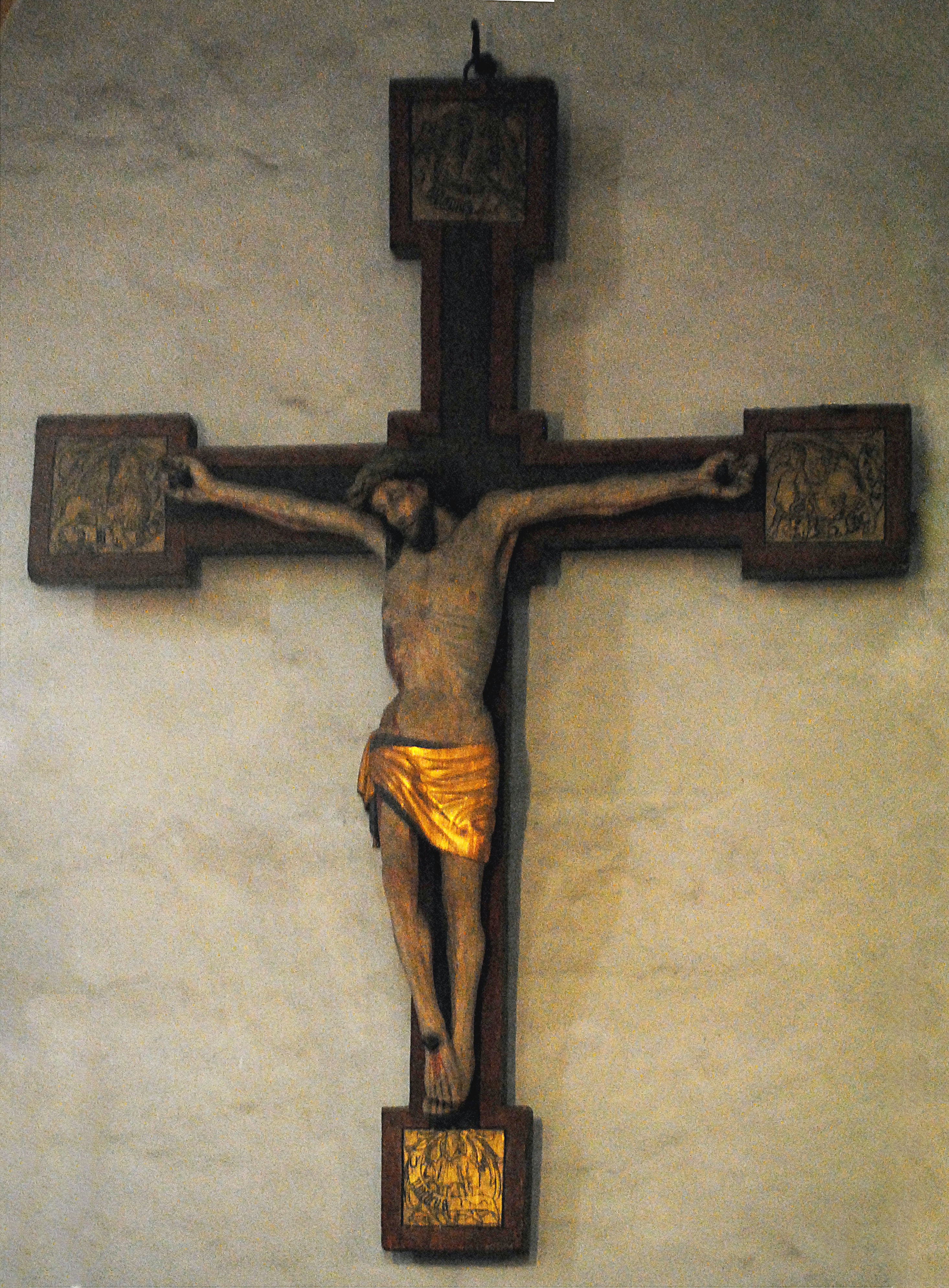 Kruzifix, Maria im Weingarten, Volkach